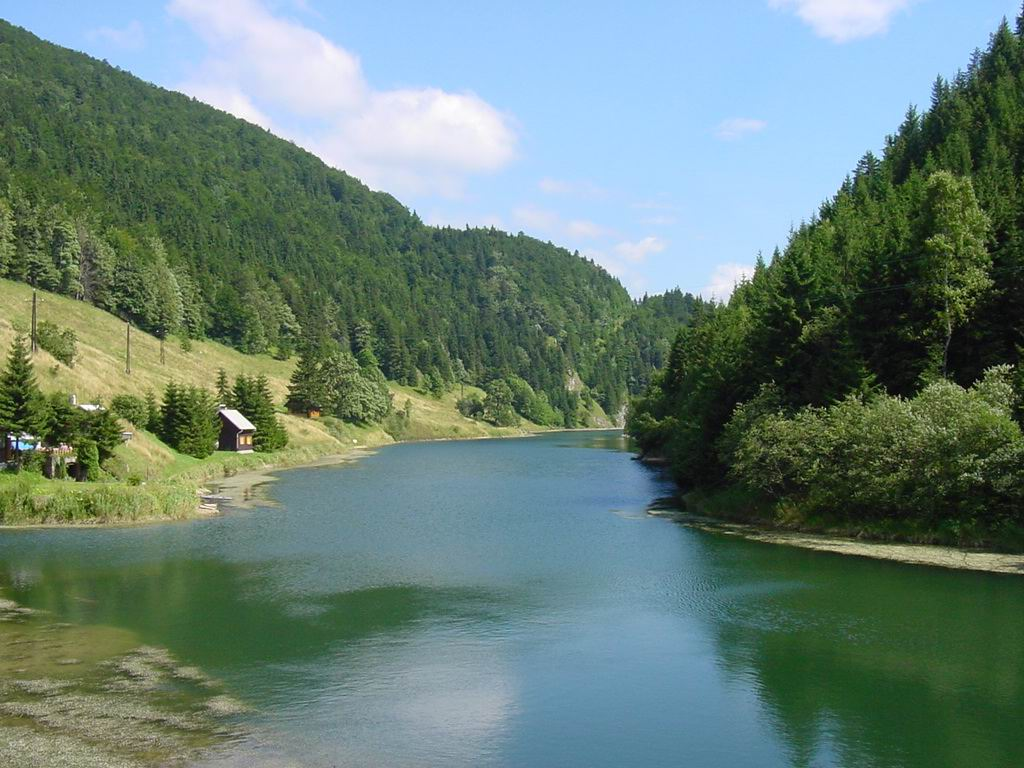 Stratenska Pila near river Hnilec